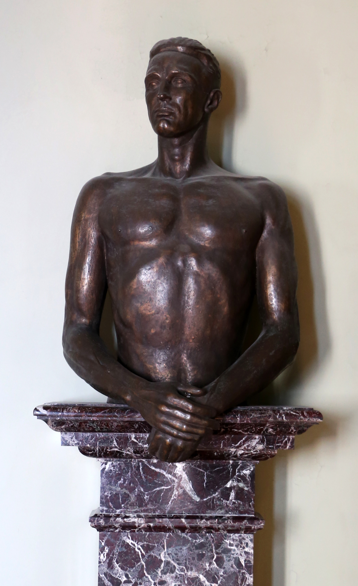 Miramare This is a photo of a monument which is part of cultural heritage of Italy. The authorisation for taking photos of this object was provided by the World Wide Fund for Nature Italy.